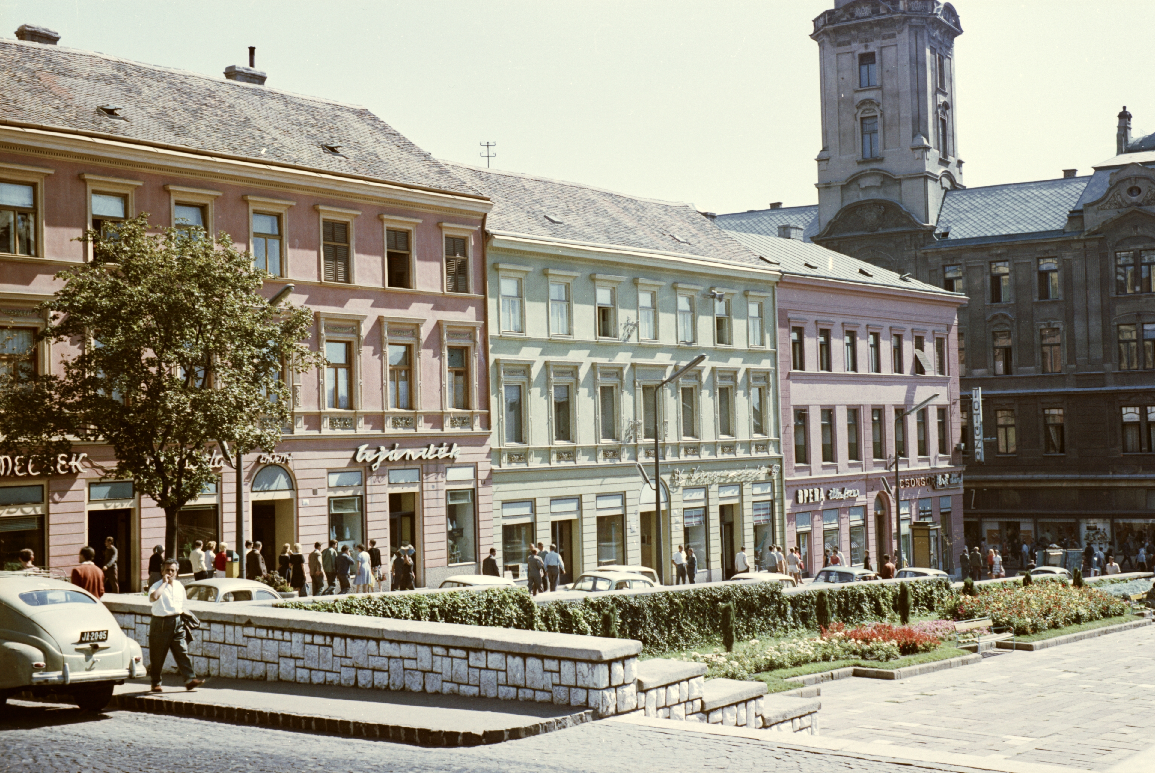 Széchenyi tér a dzsámi elől a Városháza felé nézve. Location: Hungary Tags: colorful, taxicab, number plate, neon sign Title: Széchenyi tér a dzsámi elől a Városháza felé nézve.